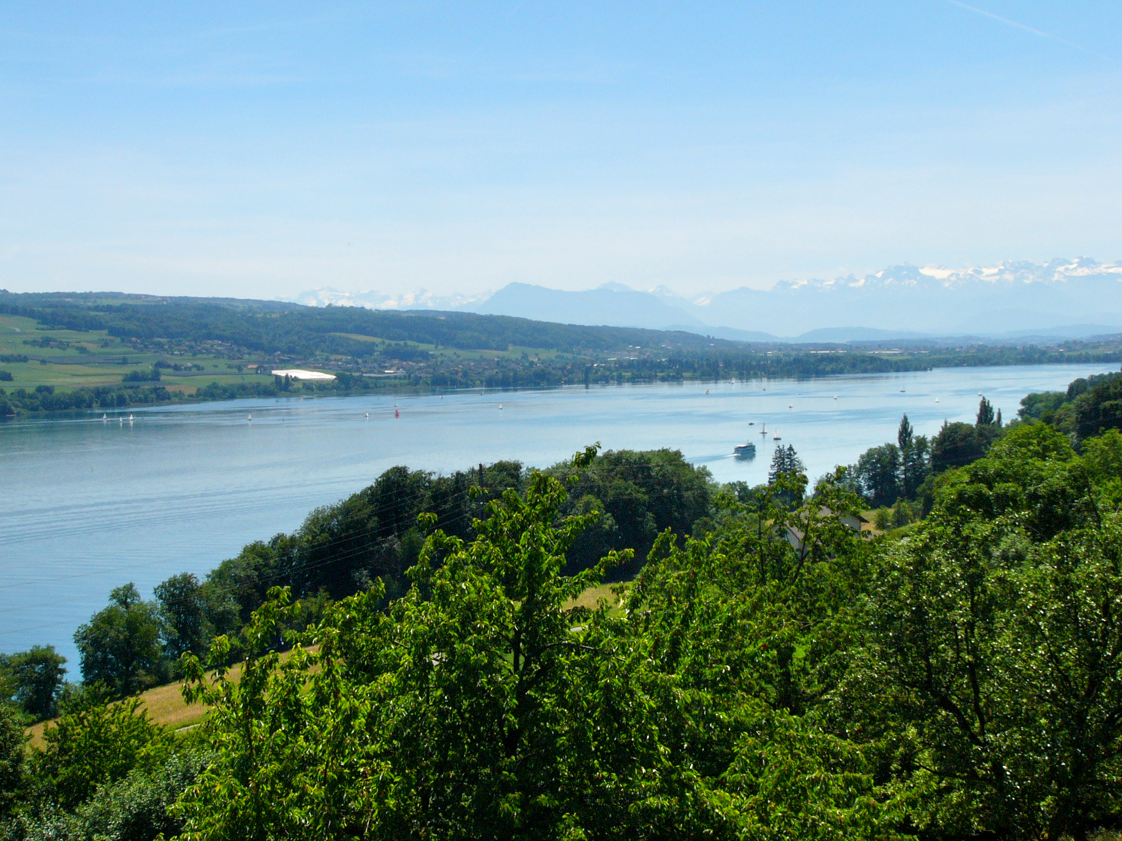 Blick von Birrwil auf den Hallwiler See in den Kantonen Aargau und Luzern, Schweiz